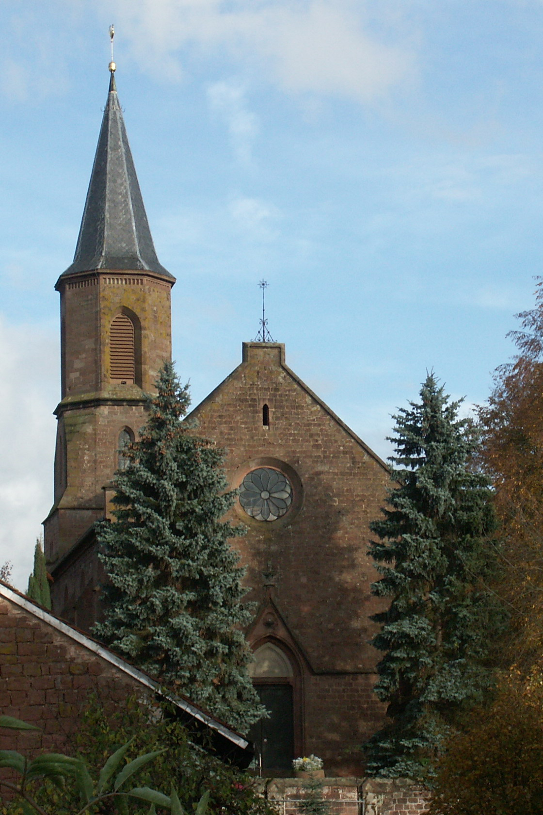 Protestantische Kirche Althornbach